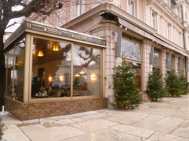 Café Bazar Anbau